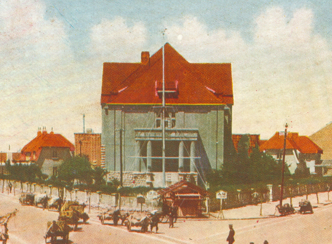 青岛胶海关街角视角